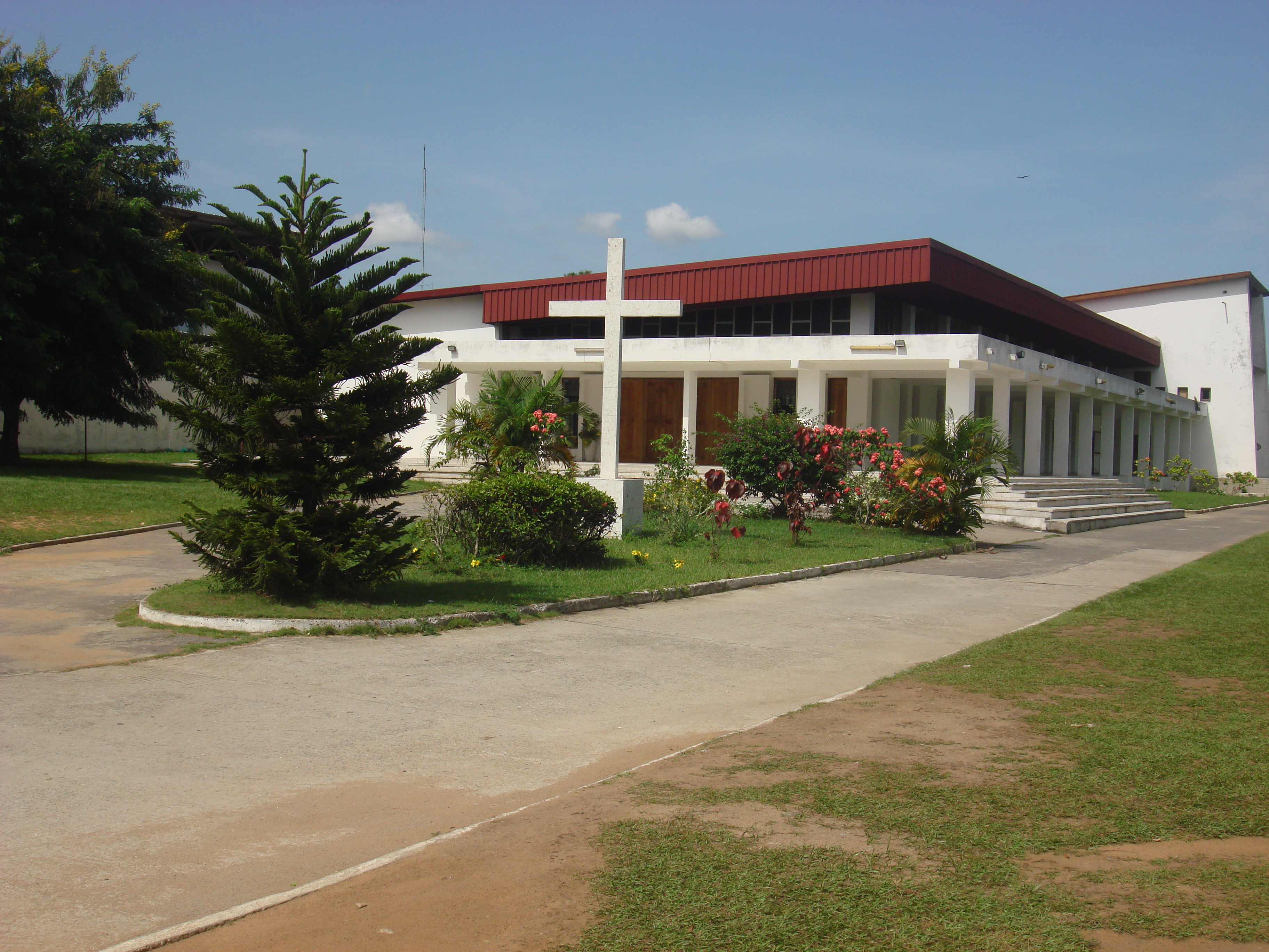 Eglise méthodiste unie de Côte d'Ivoire. Temple du jubilé de Cocody à Abidjan (Côte d'Ivoire)